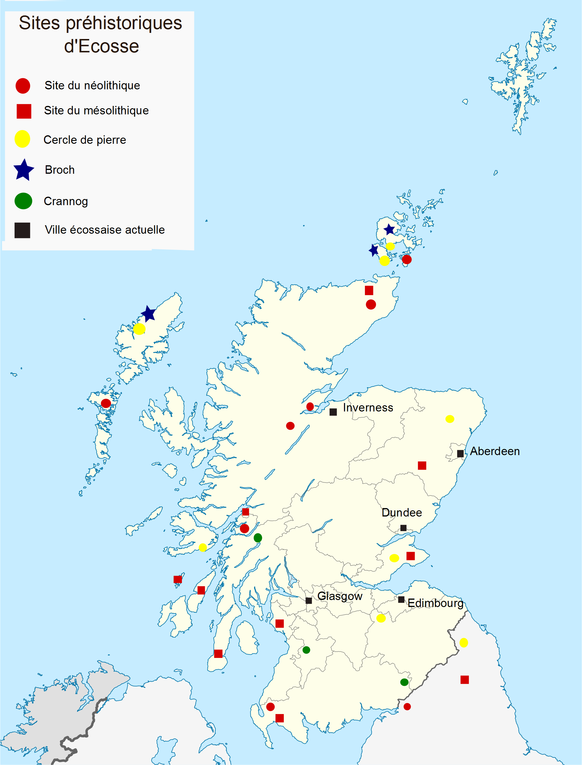 Sites préhistoriques d'Ecosse